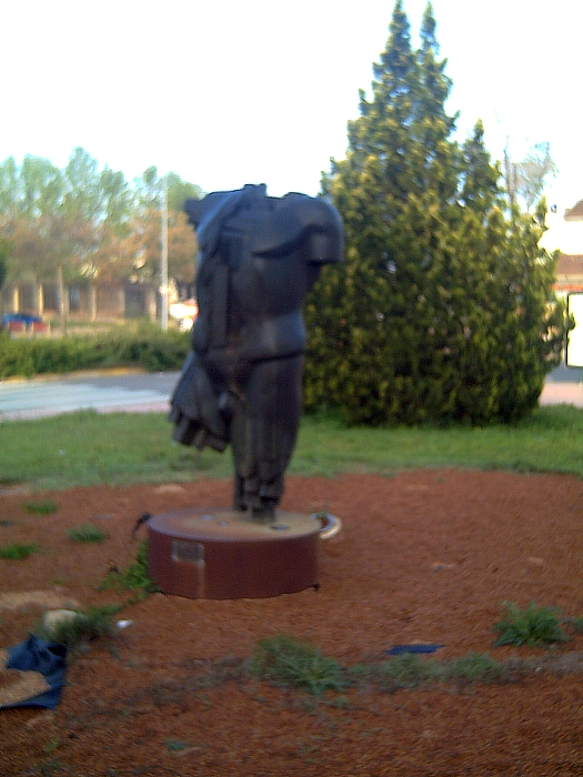 Ares torso by Carlos García Muela sculptor located in Ciudad Real AVE station garden.